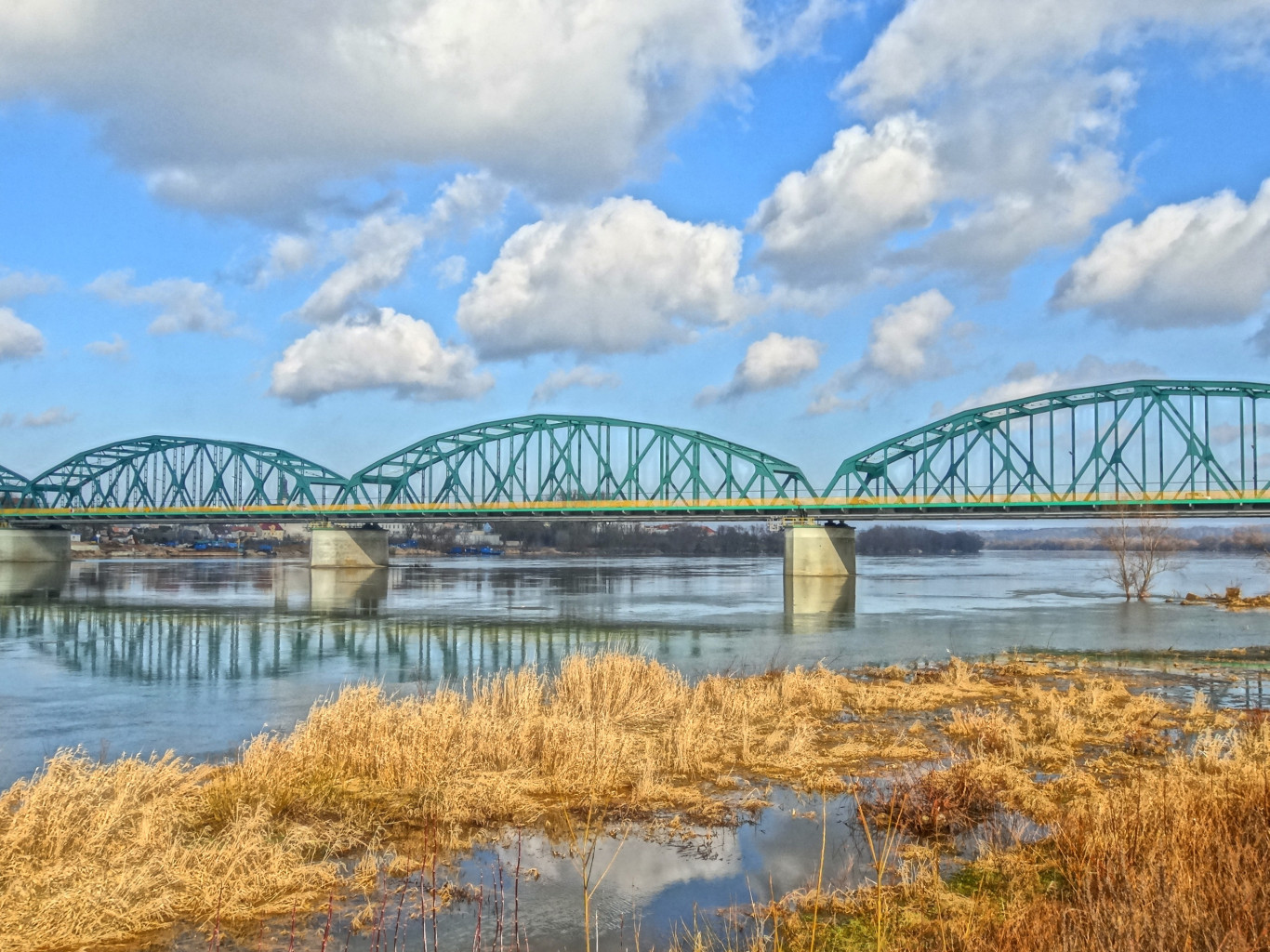 Wisła w Bydgoszczy - most fordoński im. Rudolfa Modrzejewskiego